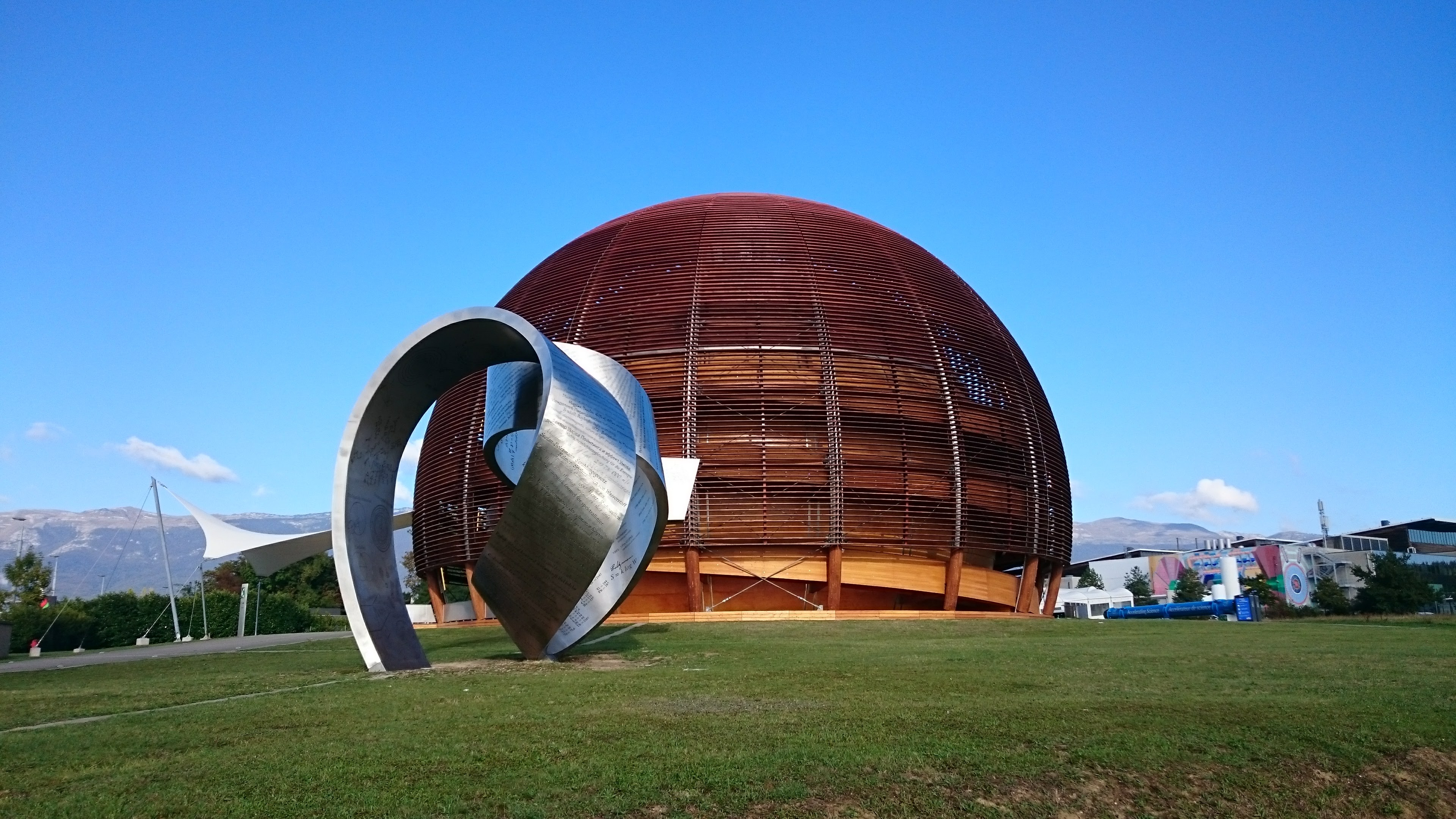 Edificio en el corazón del CERN. Metáfora del globo terrestre. Exposición en la planta baja del "Universo de partículas". 27 metros de altura y 40 metros de diámetro.